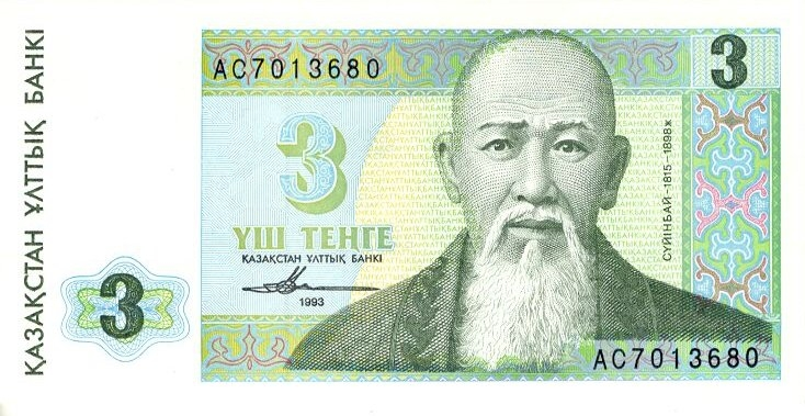 3 тенге 1993 года